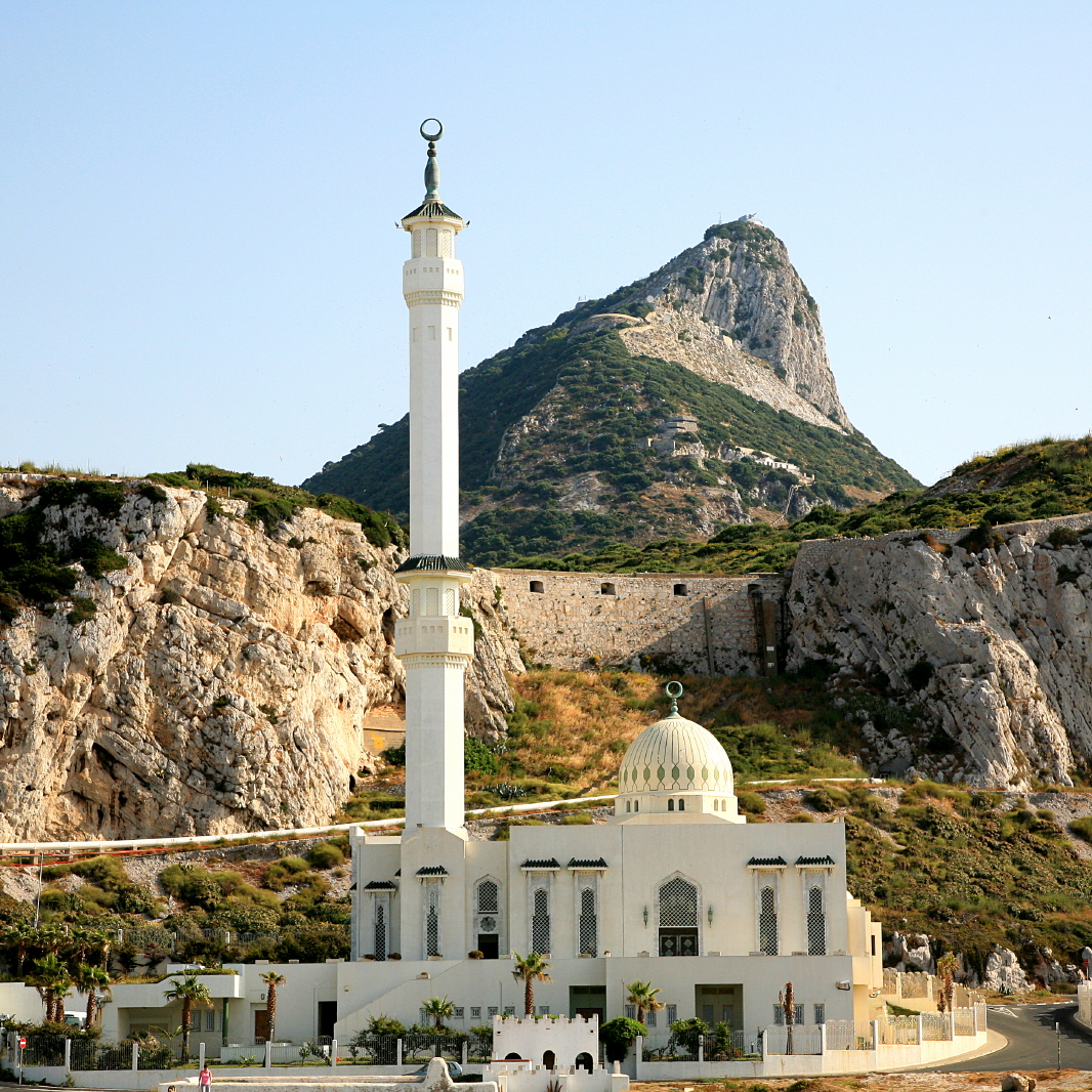 Gibraltar